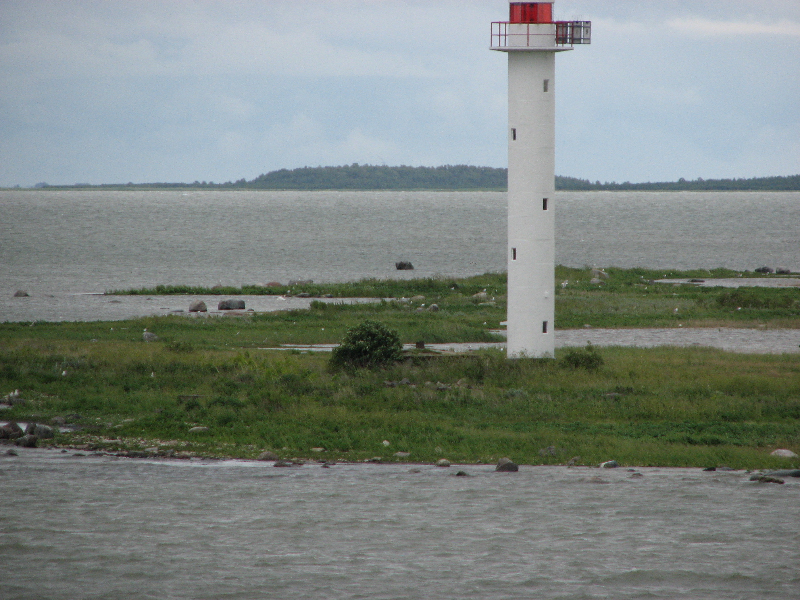 Rukkirahu island, Estonia